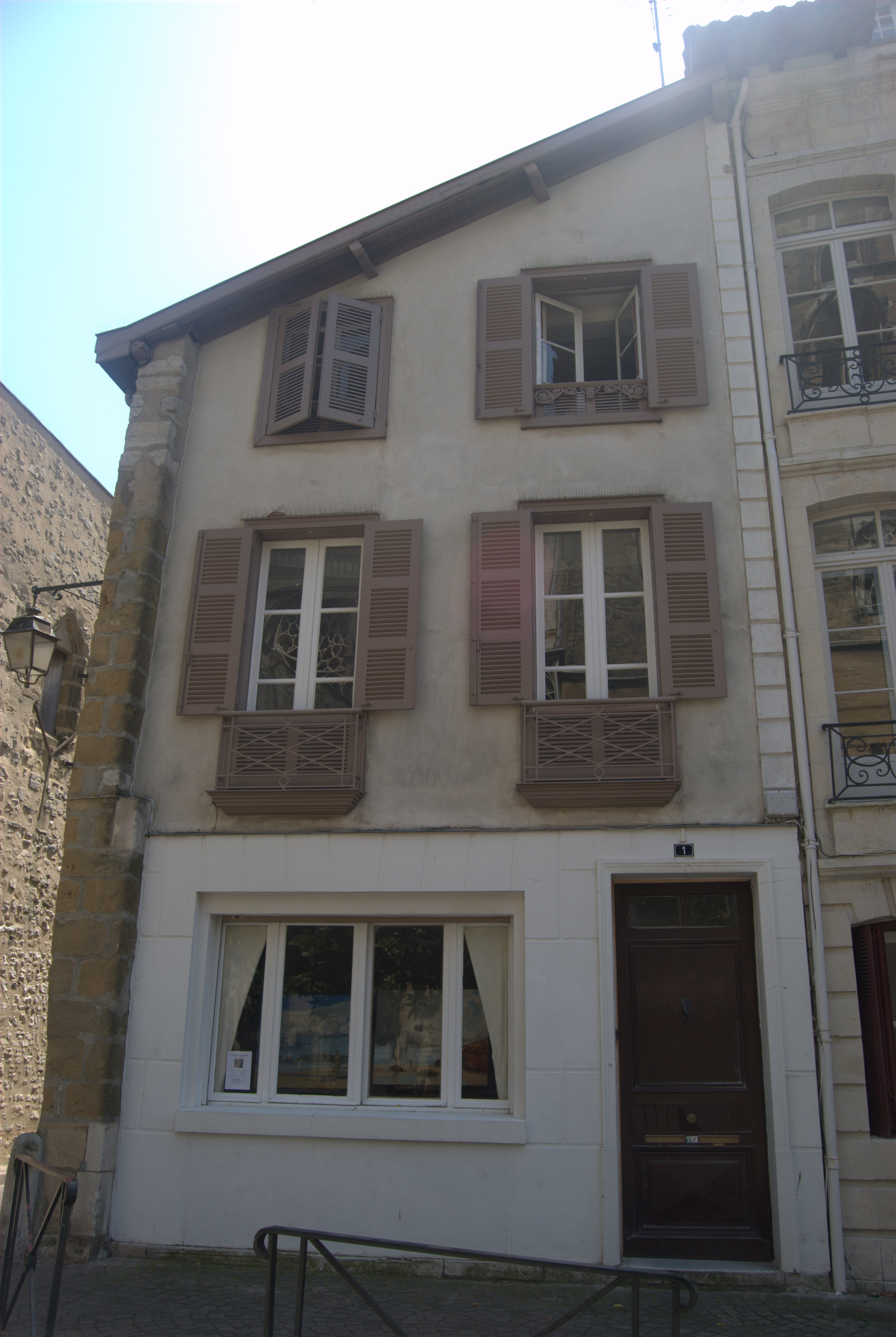 Le sous-sol de la maison Saubist, 1, rue des Prébendés à Bayonne, est classé Monument Historique.